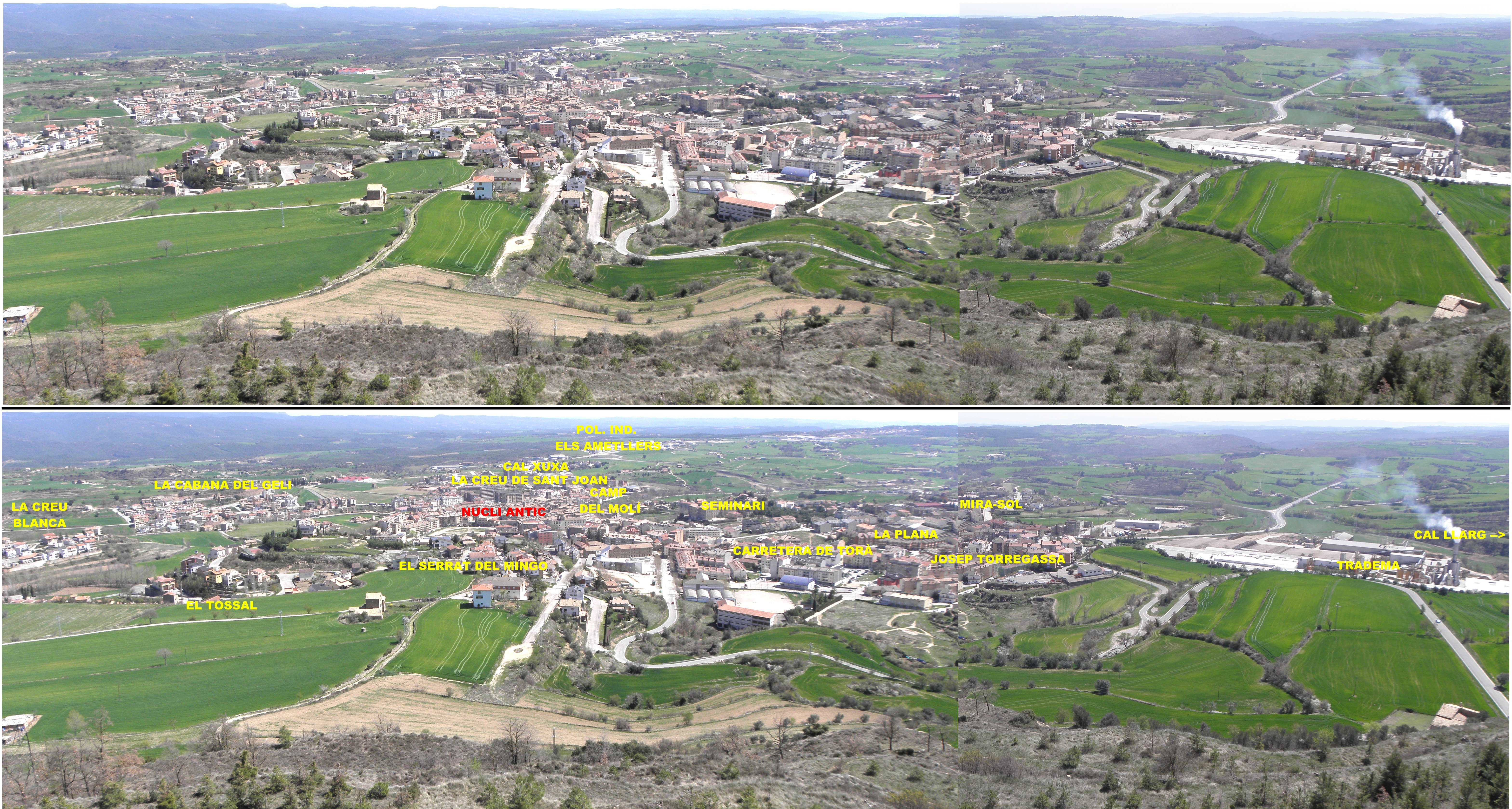 Vista general de Solsona des del Castellvell